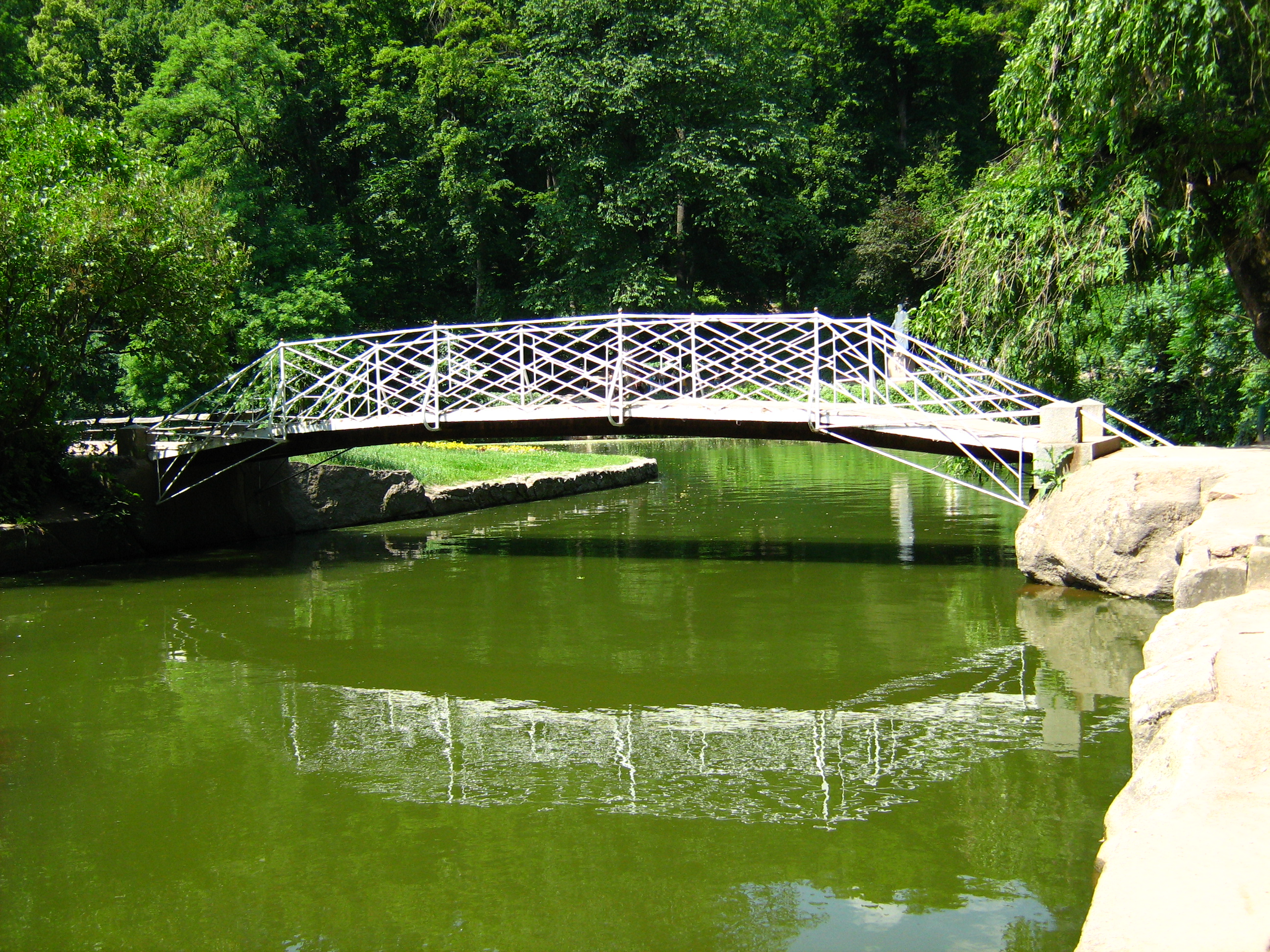 Місток на Площу Зборів у Національному дендрологічному парку «Софіївка».